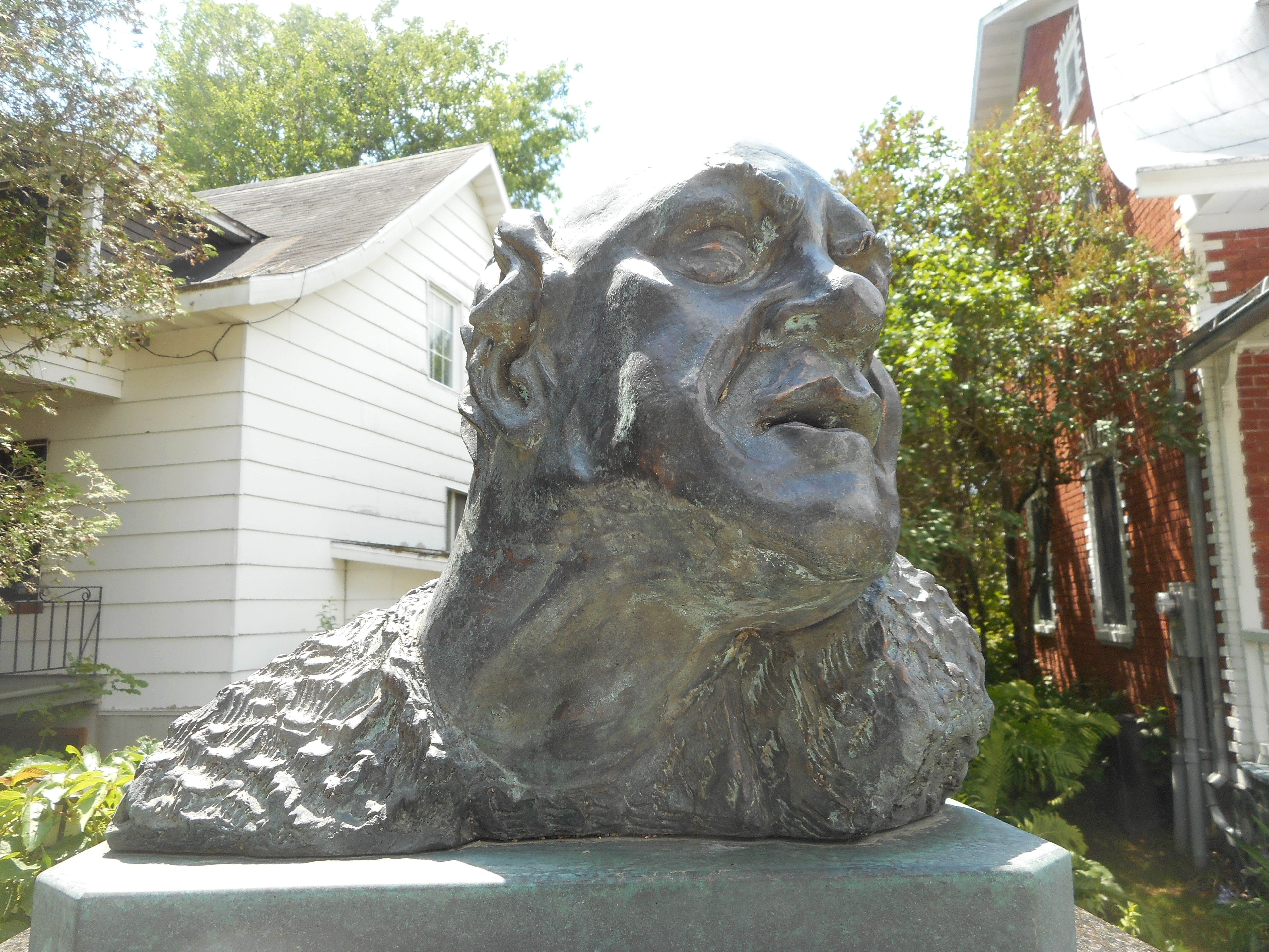 Buste de Marc-Aurèle Fortin réalisé par Jean Julien Bourgault, situé près du 61 rue Saint-Jean-Baptiste, Baie-Saint-Paul